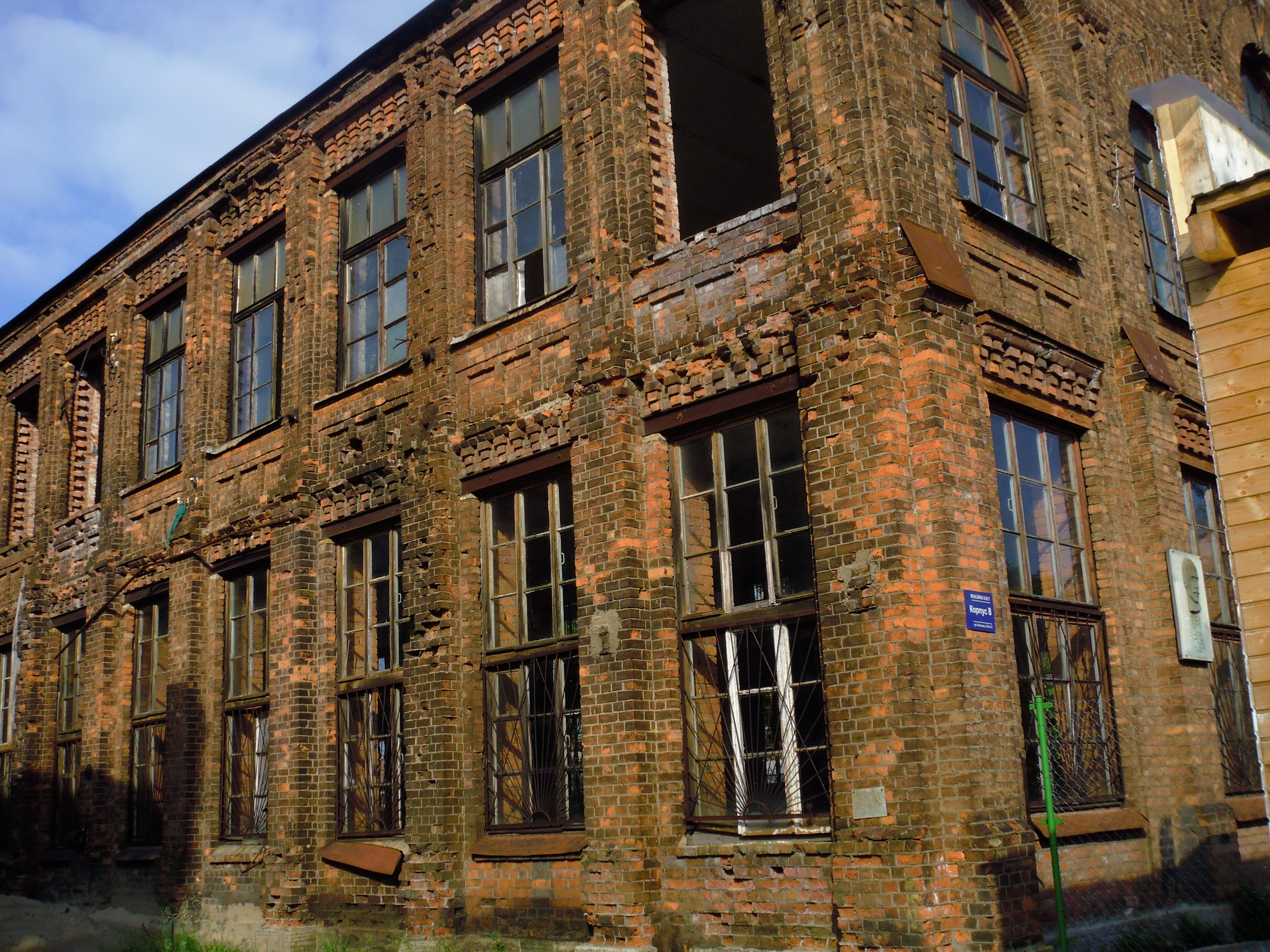 Сестрорецк. Петровский Арсенал. 8 цех. Памятник культурно-исторического наследия промышленной архитектуры из красного кирпича, находится под охраной государства и КГИОП СПб.